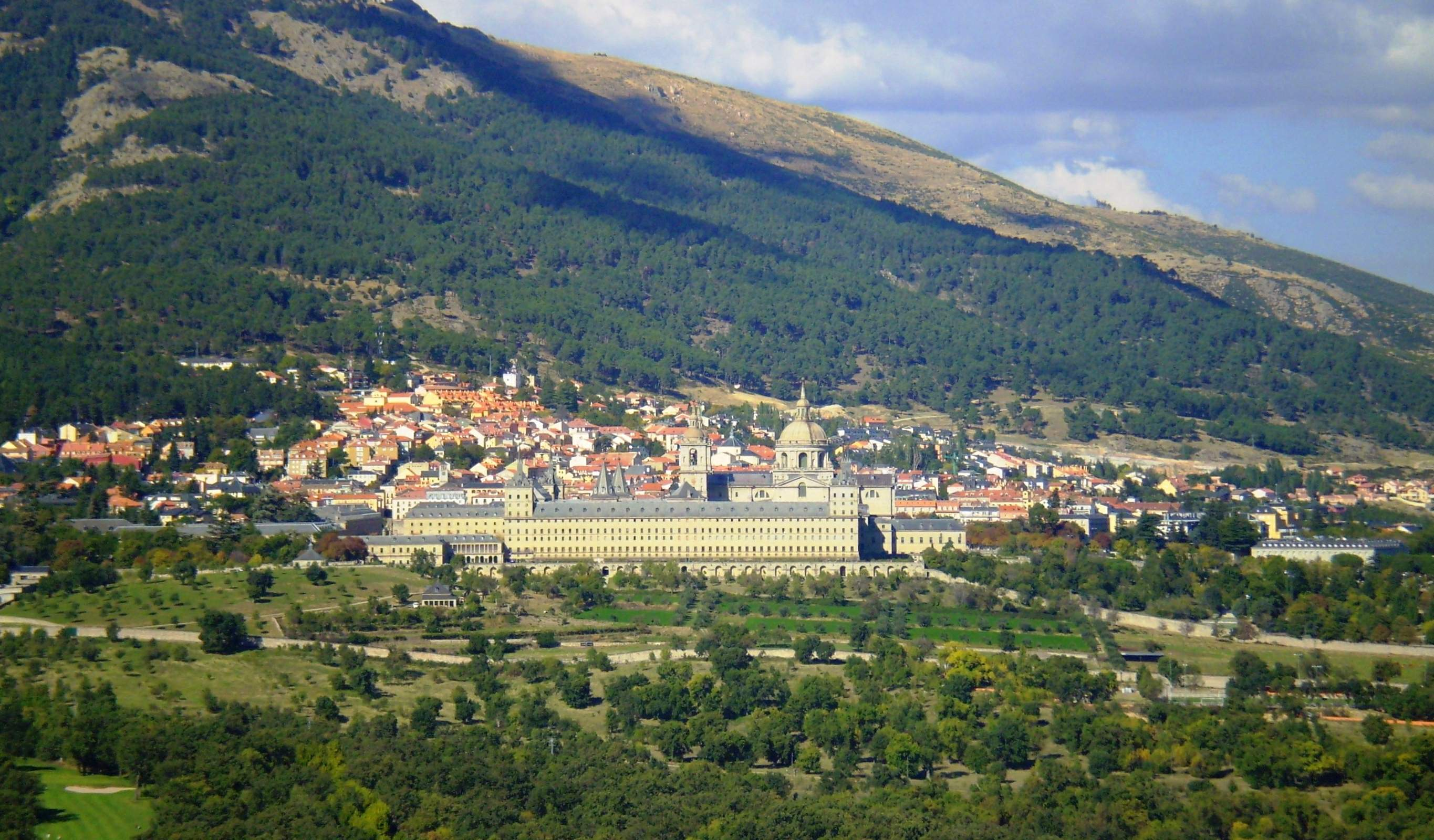 View of San Lorenzo de El Escorial from Philip II Seat. Community of Madrid, Spain. Vista de San Lorenzo de El Escorial desde la Silla de Felipe II. Comunidad de Madrid, España